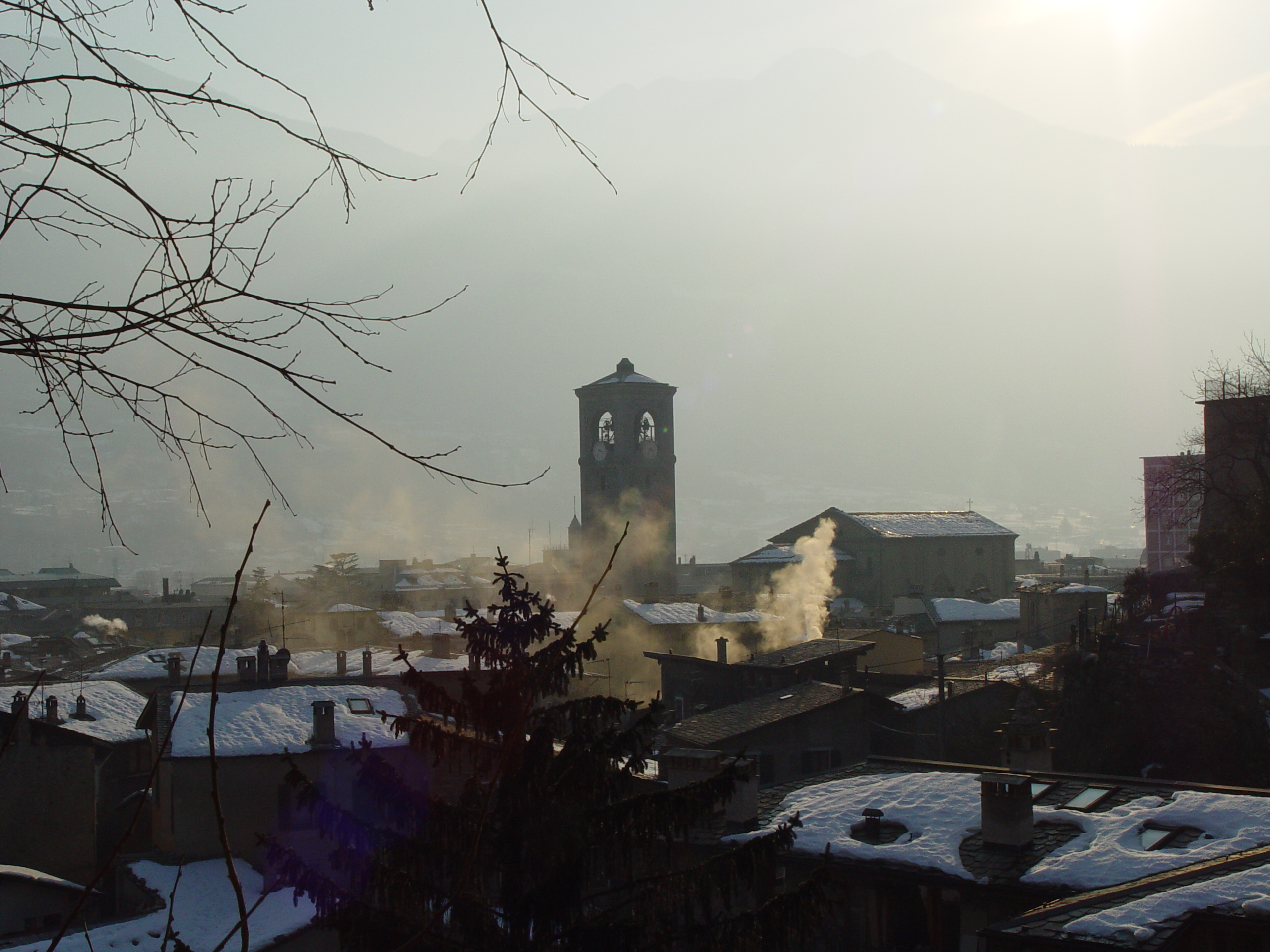 Sondrio, Lombardia, Italia